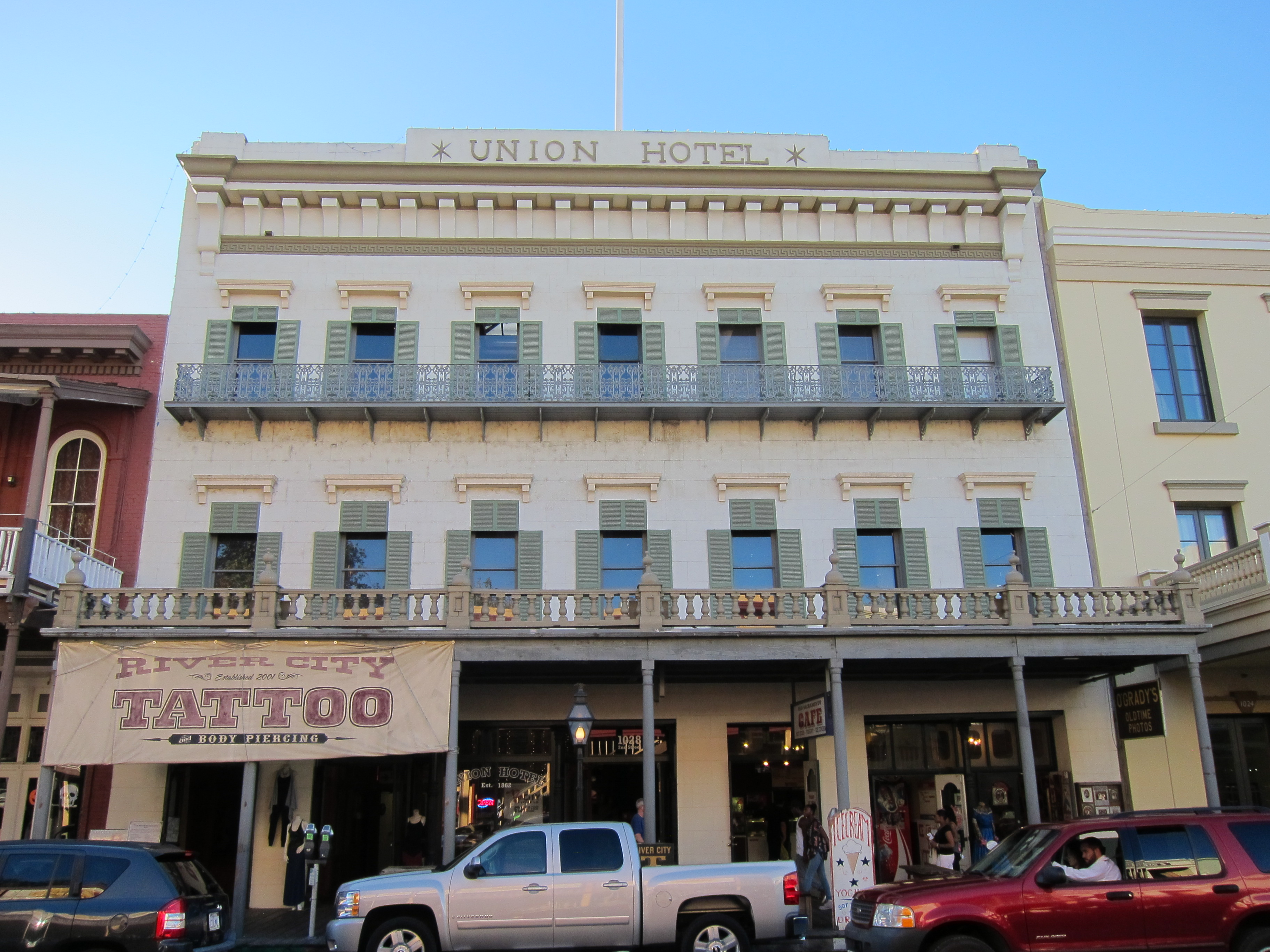 Central Sacramento, Sacramento, CA, USA